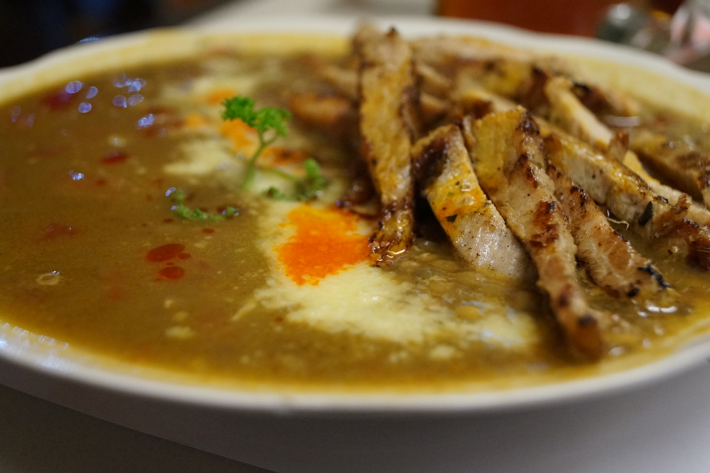 Plato de guiso de lentejas con cortes de malaya de cerdo. Fuente Las Cabras, Providencia, Santiago de Chile.